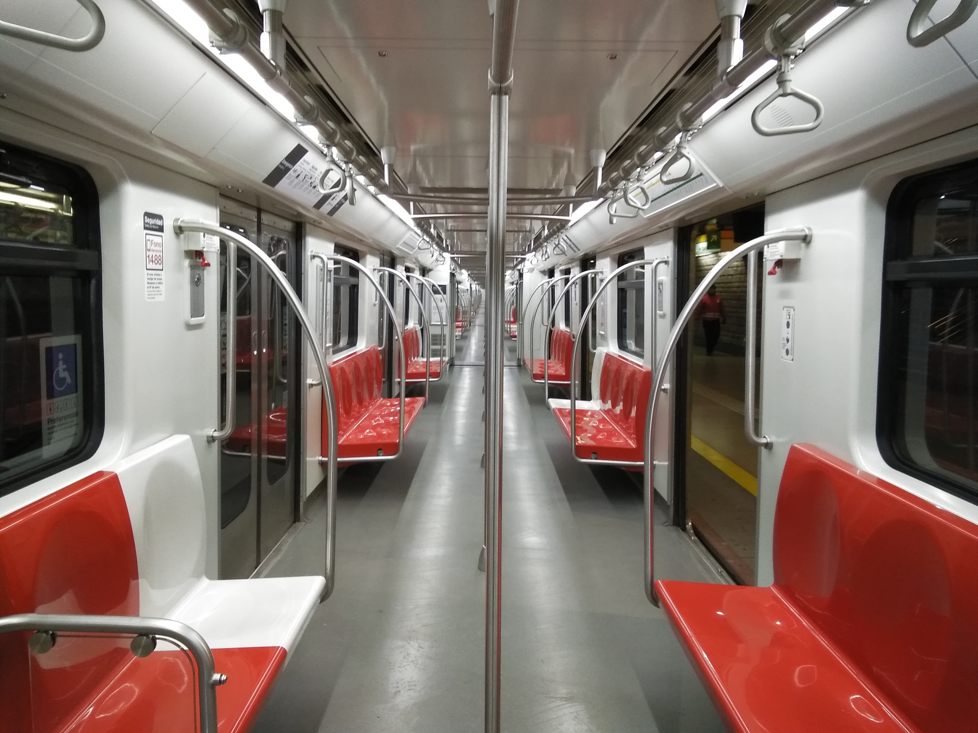 Vista del interior de un tren NS 2016 del metro de Santiago